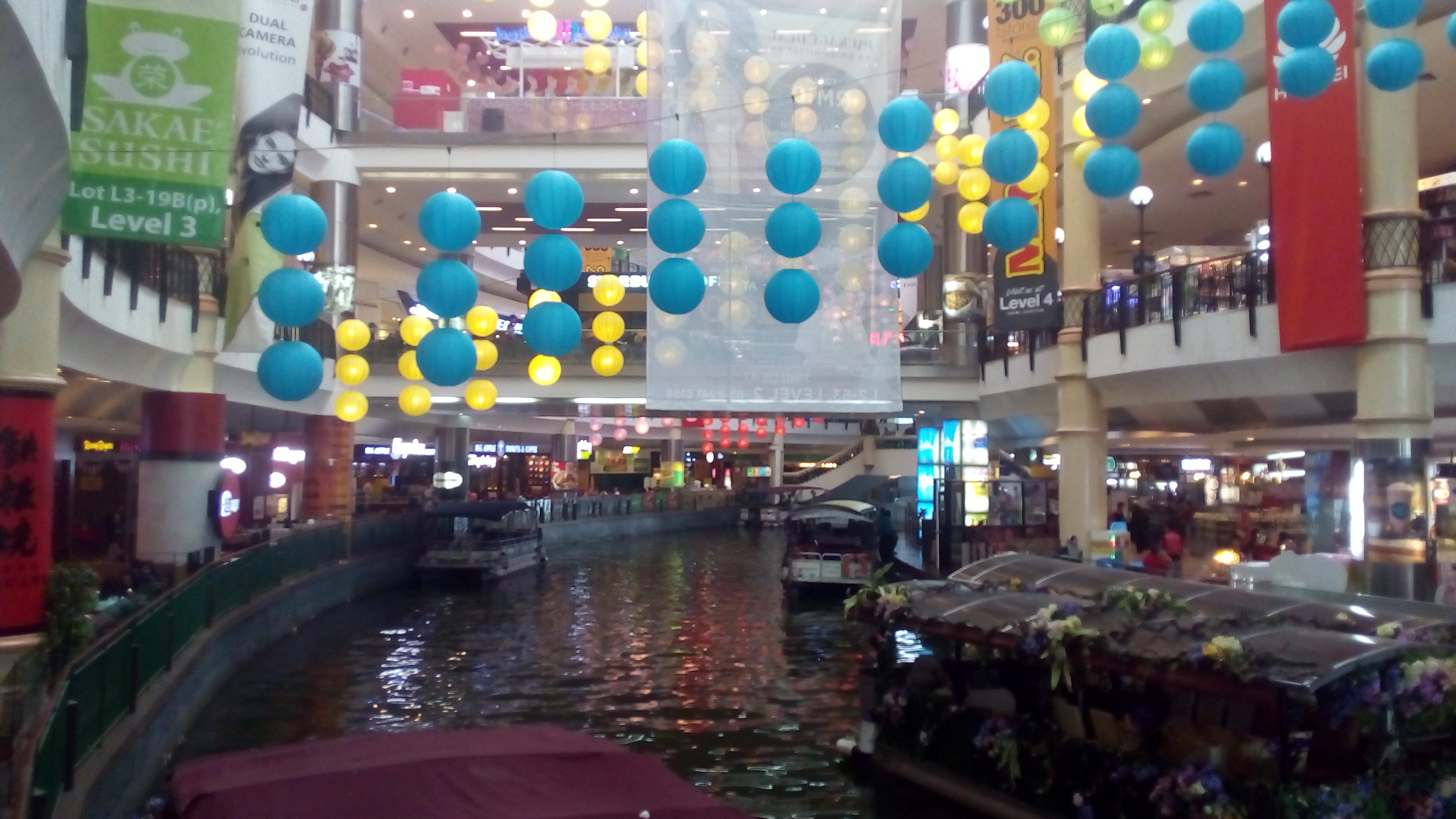 绿水坊购物中心内部的河流